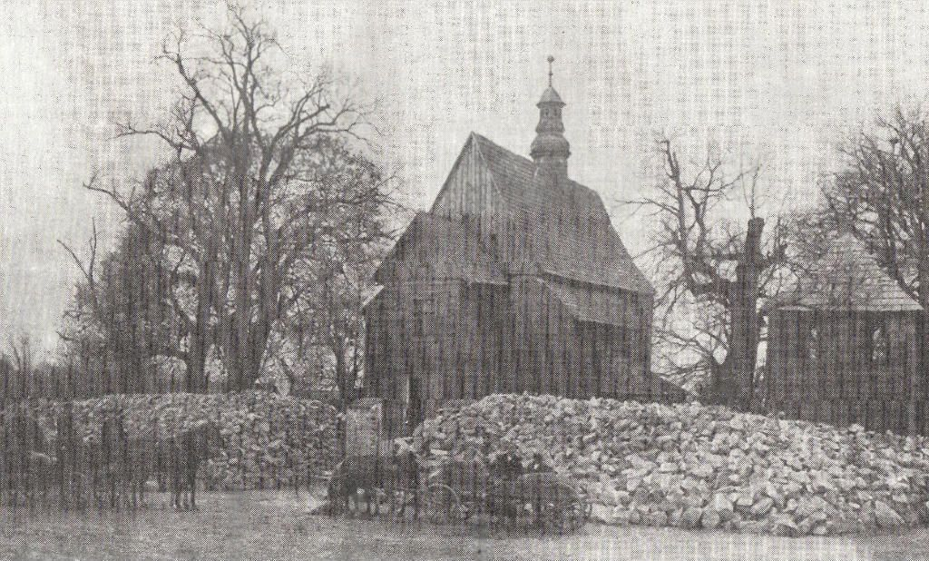 Drewniany kościół w Olbierzowicach. Rozebrany około 1910 roku.